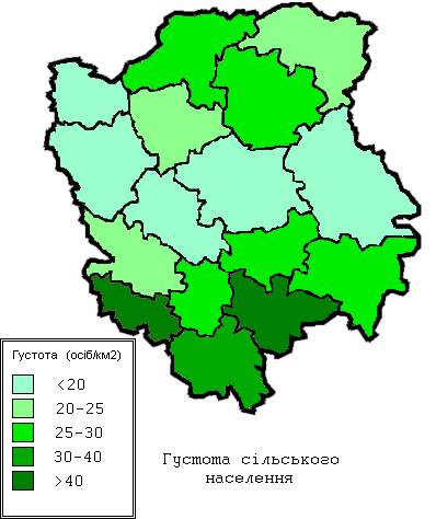 Volyn Rural Population Density 2010: Густота сільського населення Волинської області на поч. 2010 року